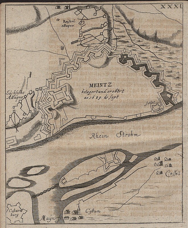 Original image description from the Deutsche Fotothek Architektur & Festungsbau